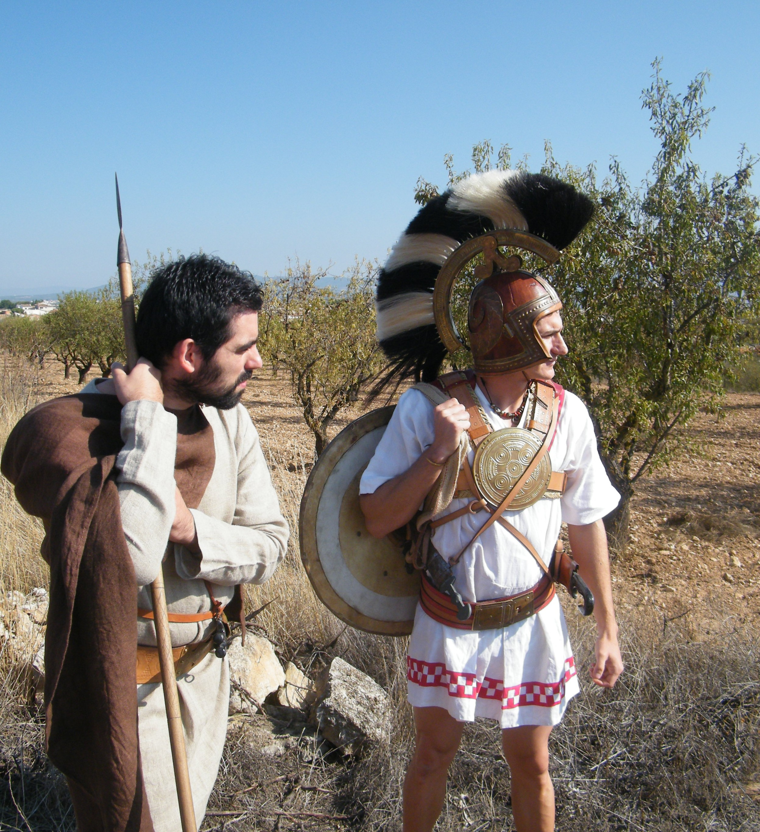 Recreación de guerreros iberos: del siglo VI a. C, a la izquierda, y del siglo III a. C., a la derecha. VII Jornada de puertas abiertas del recinto arqueológico de Kelin. Paraje los Villares, Caudete de las Fuentes, Valencia.